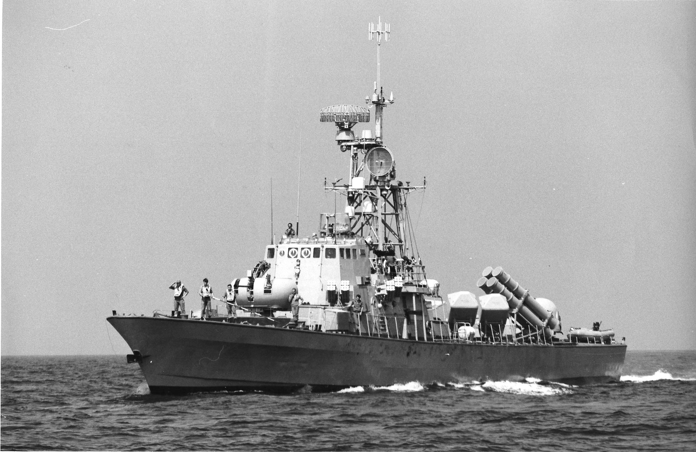 ספינת סער 4 נושאית טילי הרפון